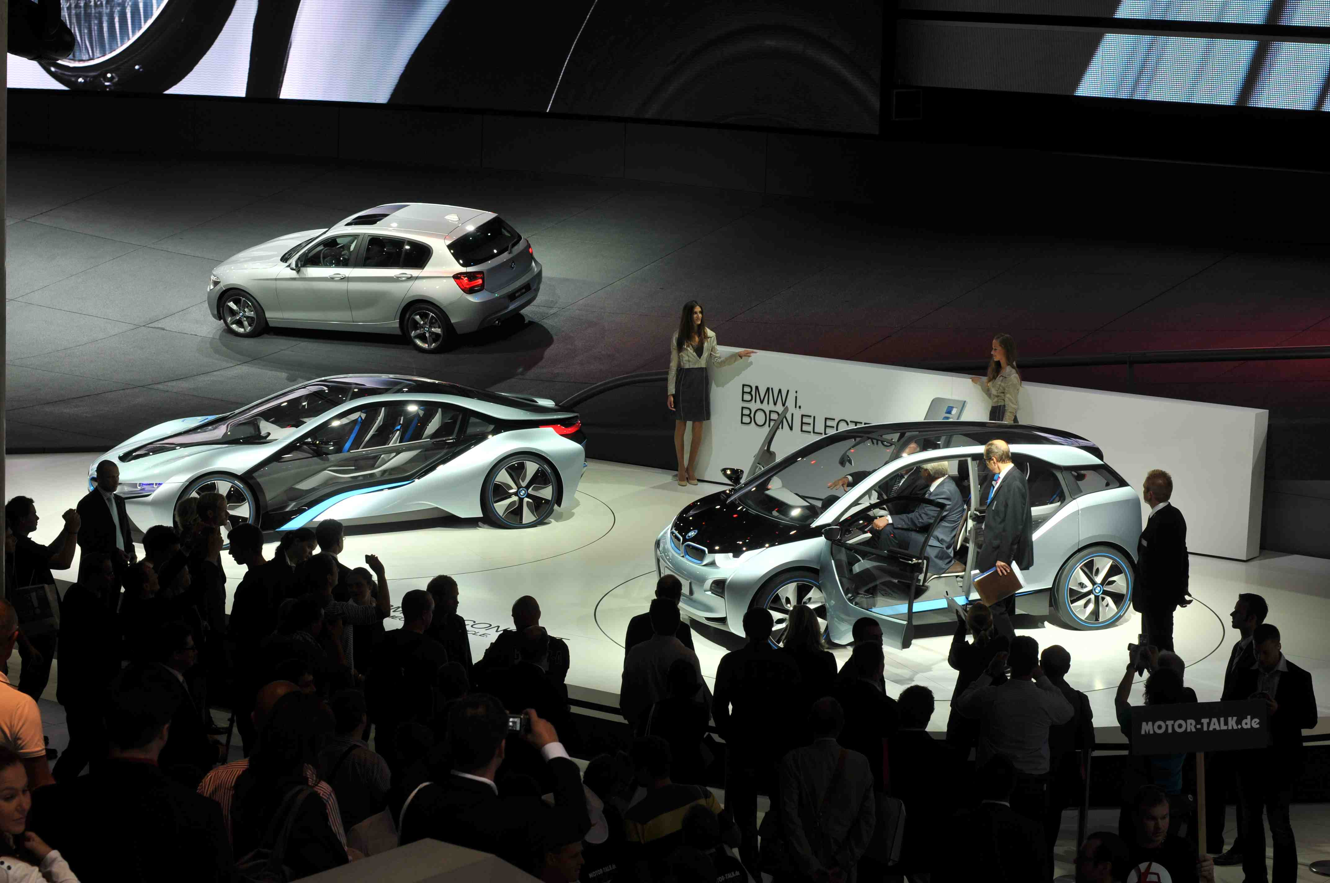 IAA 2011 - Internationale Automobilausstellung in Frankfurt/Main